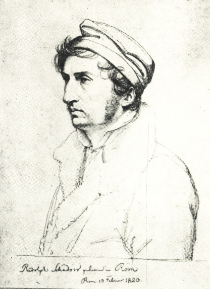 Porträt des Bildhauers Rudolph (auch Rudolf) Schadow.